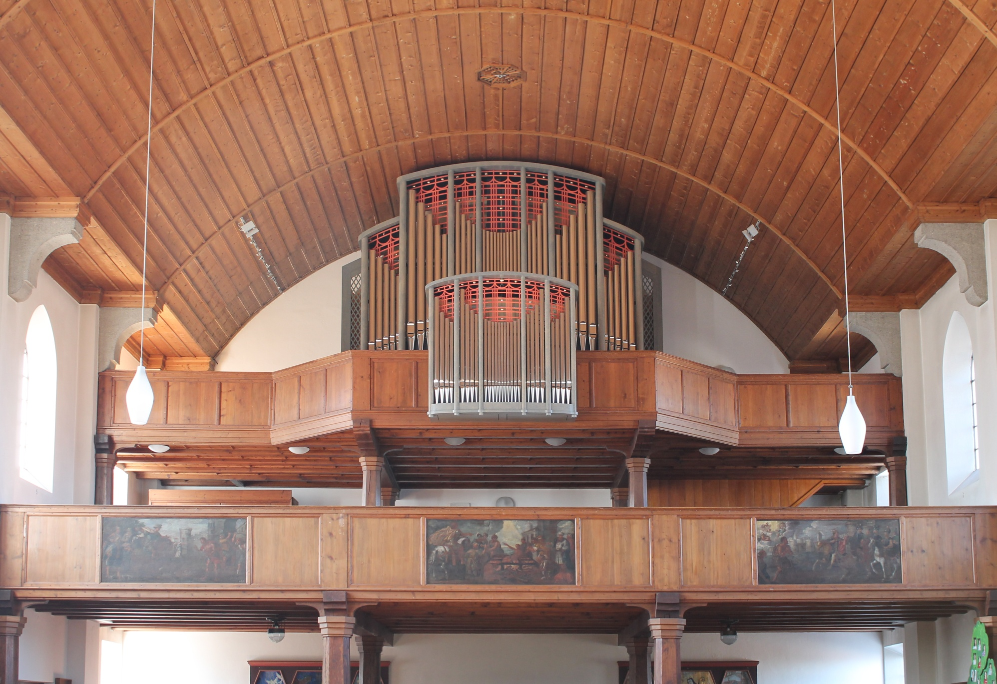 Orgel von ST. Laurentius in Bernau am Chiemsee (2013, Siegfried Schmid, III/27)